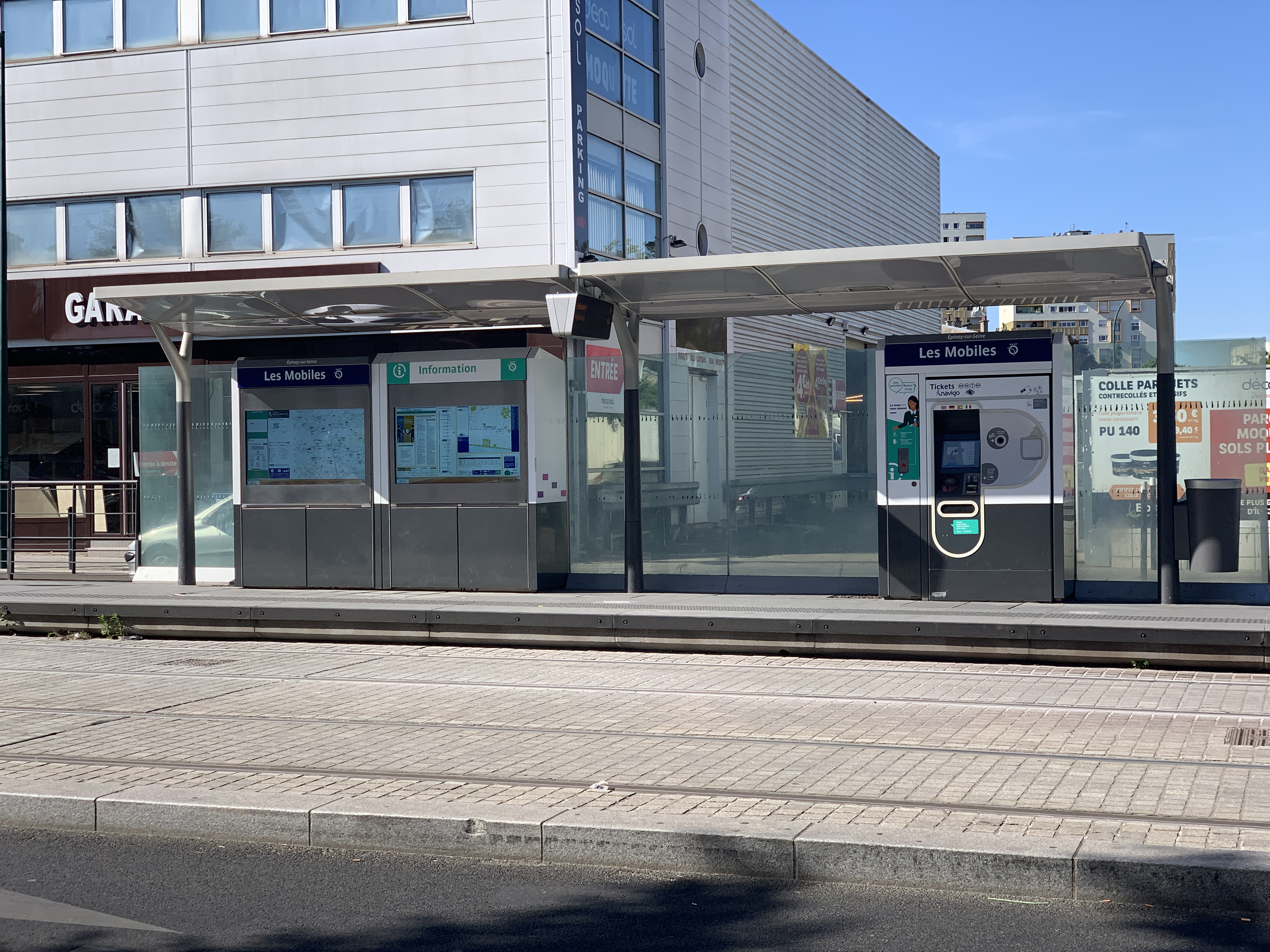 Station de tramway Lacépède, ligne 8 du tramway d'Île-de-France, Épinay-sur-Seine.